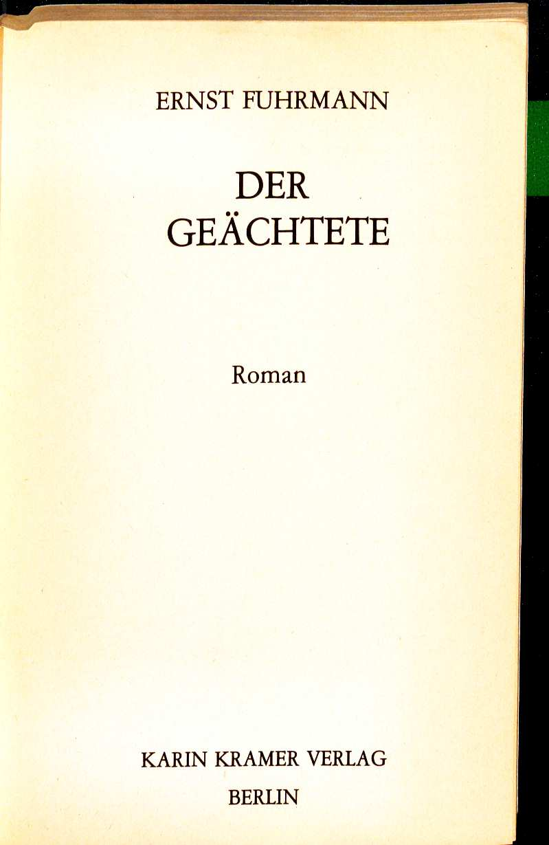 Ernst Fuhrmann Der Geächtete 1986 Titel